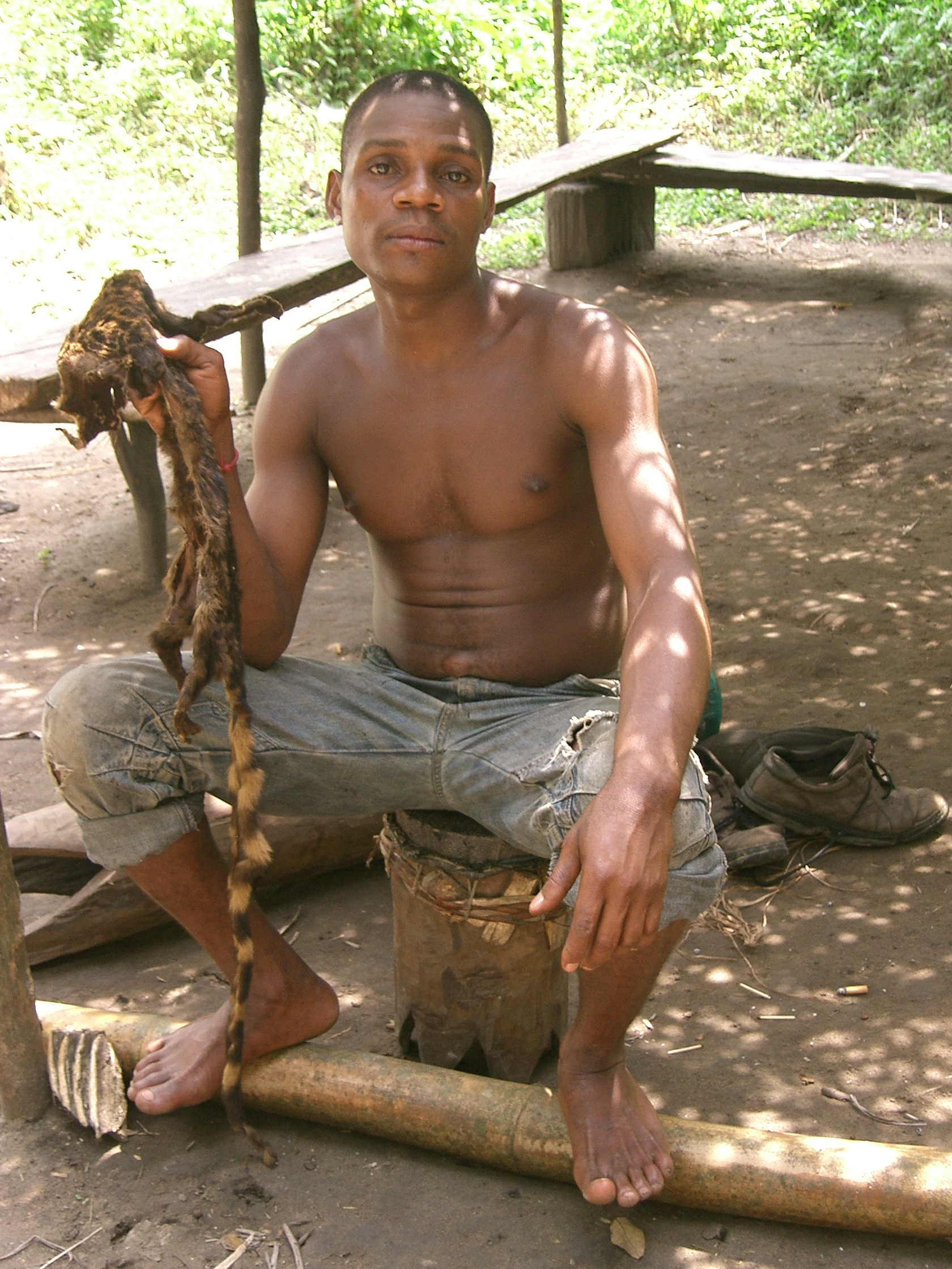 Afrique : Campement pygmée : jeune homme portant la marque de chefferie. Cameroun - rivière Lobé